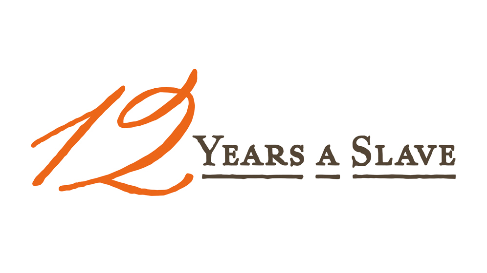 Logotipo de la película 12 Years a Slave (12 años de esclavitud), dirigida por Steve McQueen y protagonizada por Chiwetel Ejiofor y Michael Fassbender.